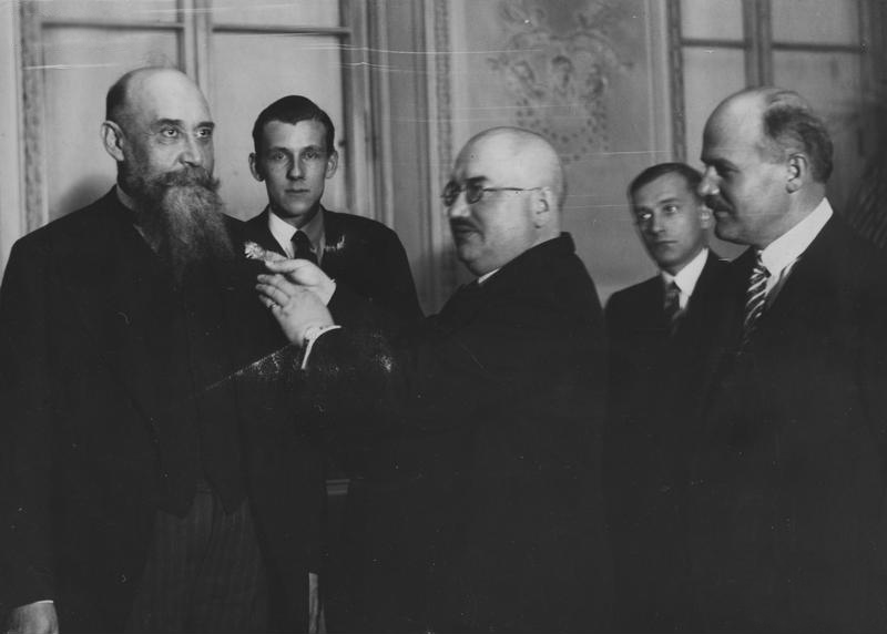 El primer ministro rumano, Nicolae Iorga (con barba), siendo condecorado en Polonia en 1933.